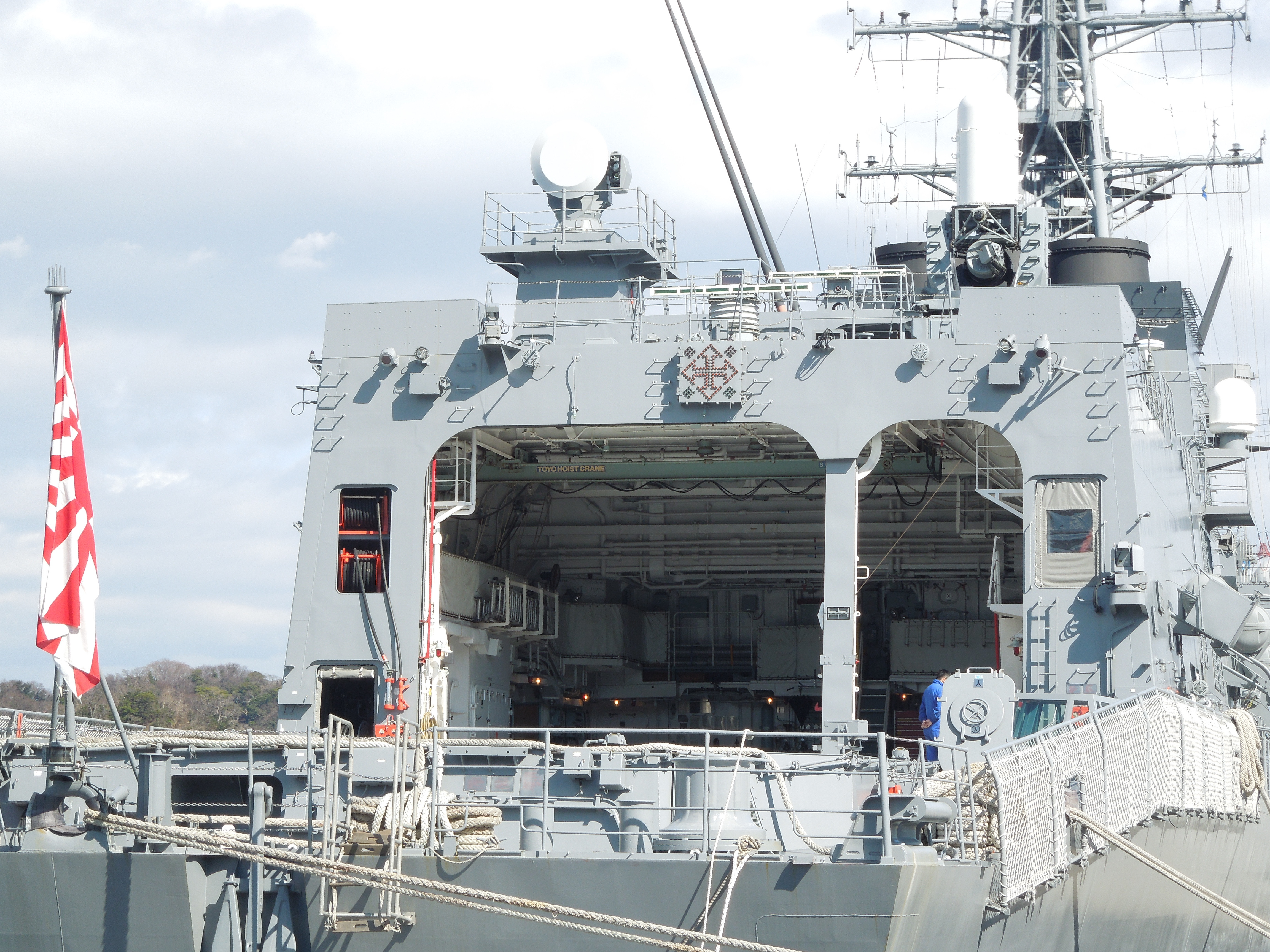 護衛艦むらさめの格納庫